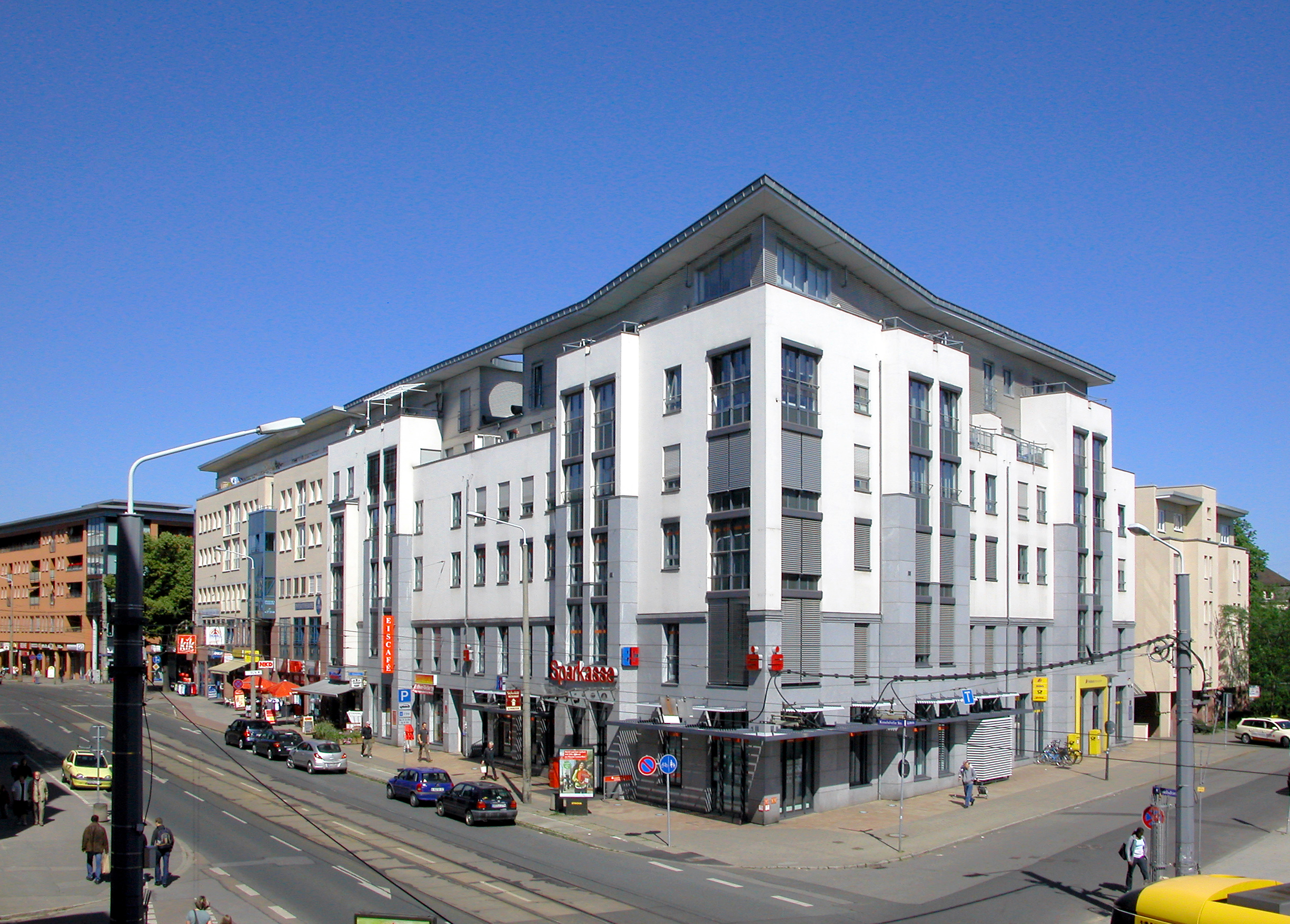 13.06.2009 01159 Dresden-Löbtau: Einkaufszentrum und Bürohaus Kesselsdorfer Str. 12-16; Ecke Gröbelstraße / Reisewitzer Straße. (GMP: 51.043940,13.701544) [DSCN37889.TIF]20090613040DR.JPG(c)Blobelt)